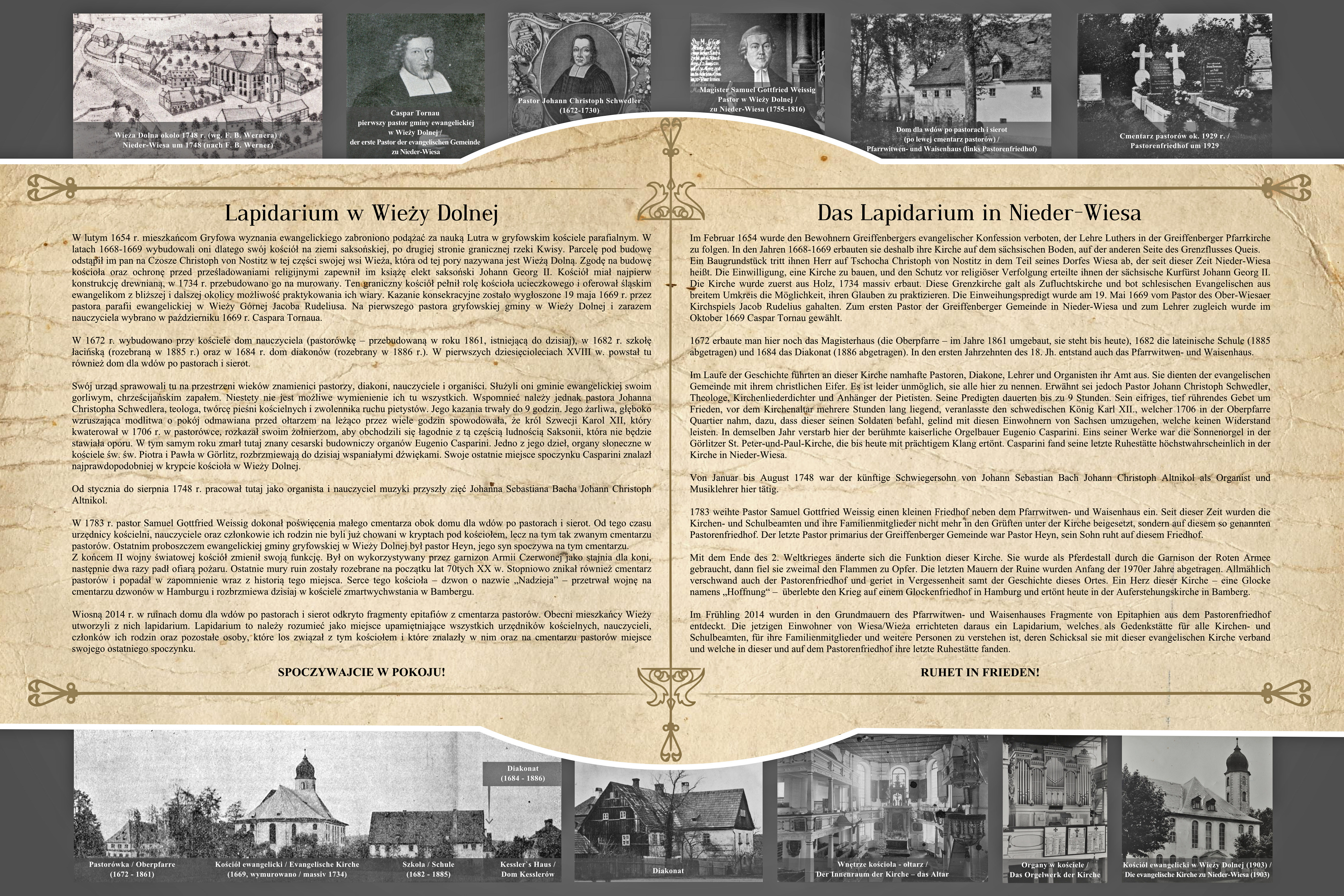 Tablica informacyjna Lapidarium w Wieży dolnej (Text: Jaroslaw Bogacki, Design: Mariusz Dragan)